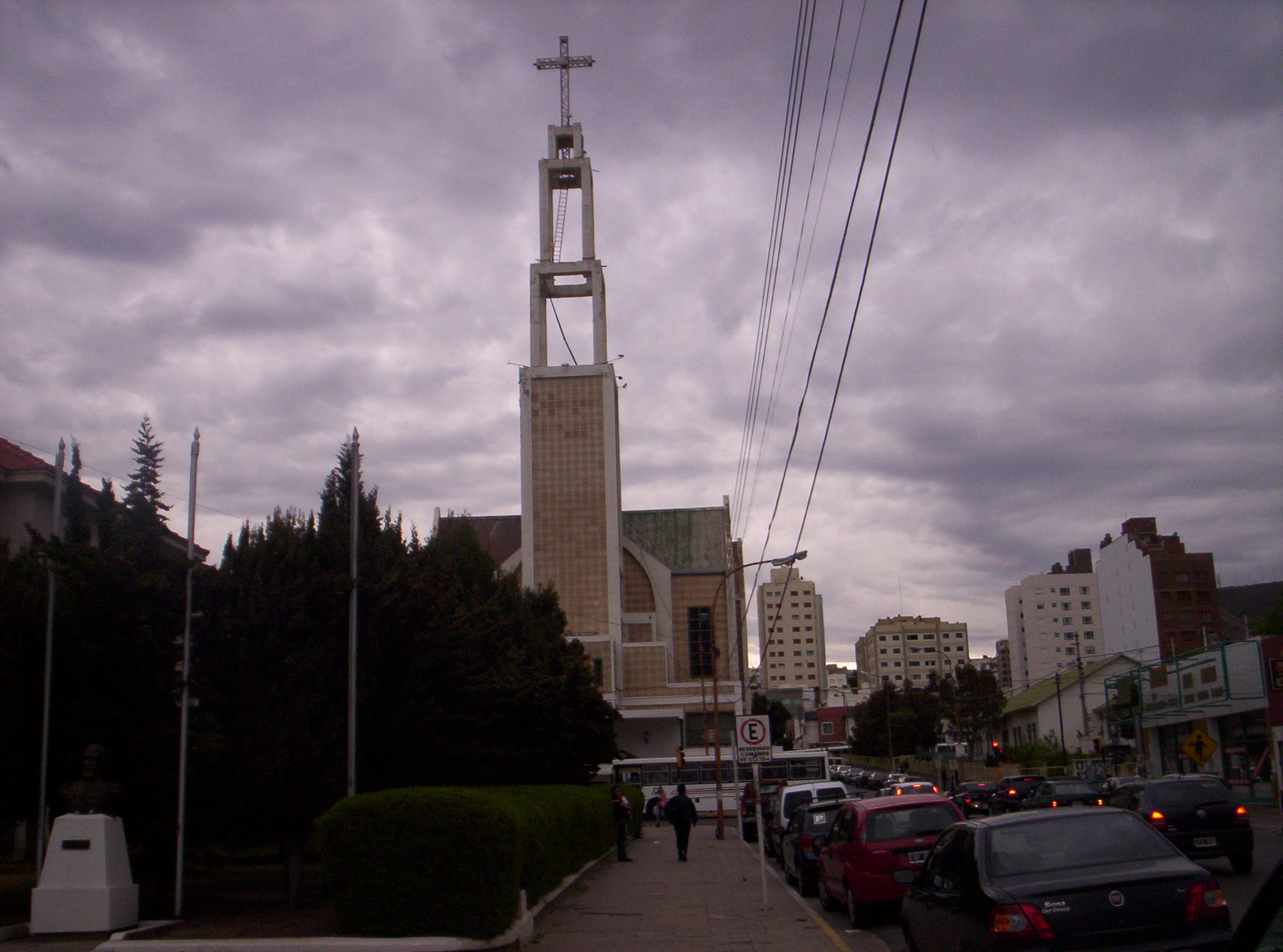 vista frontal de la Catedral San Juan Bosco de Comodoro Rivadavia